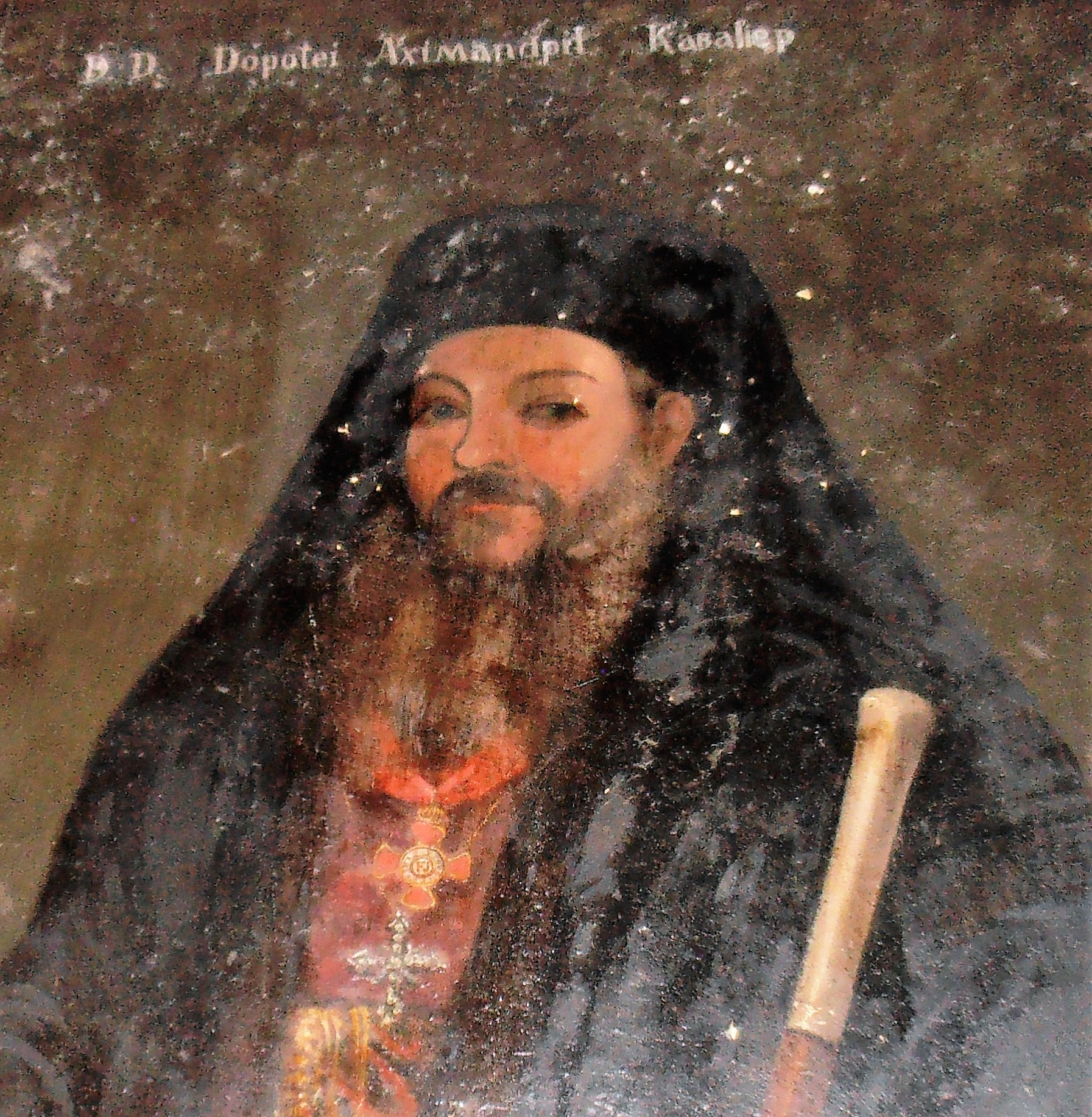 Tablou votiv aflat în biserica Mânăstirii Jitianu, pictat de Costache Petrescu în 1852.